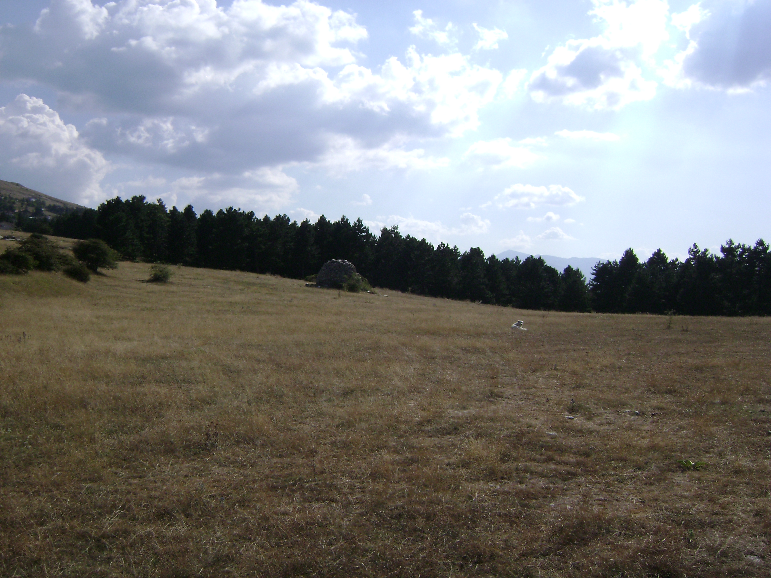 Una caciara di San Giacomo - Villa Castellana